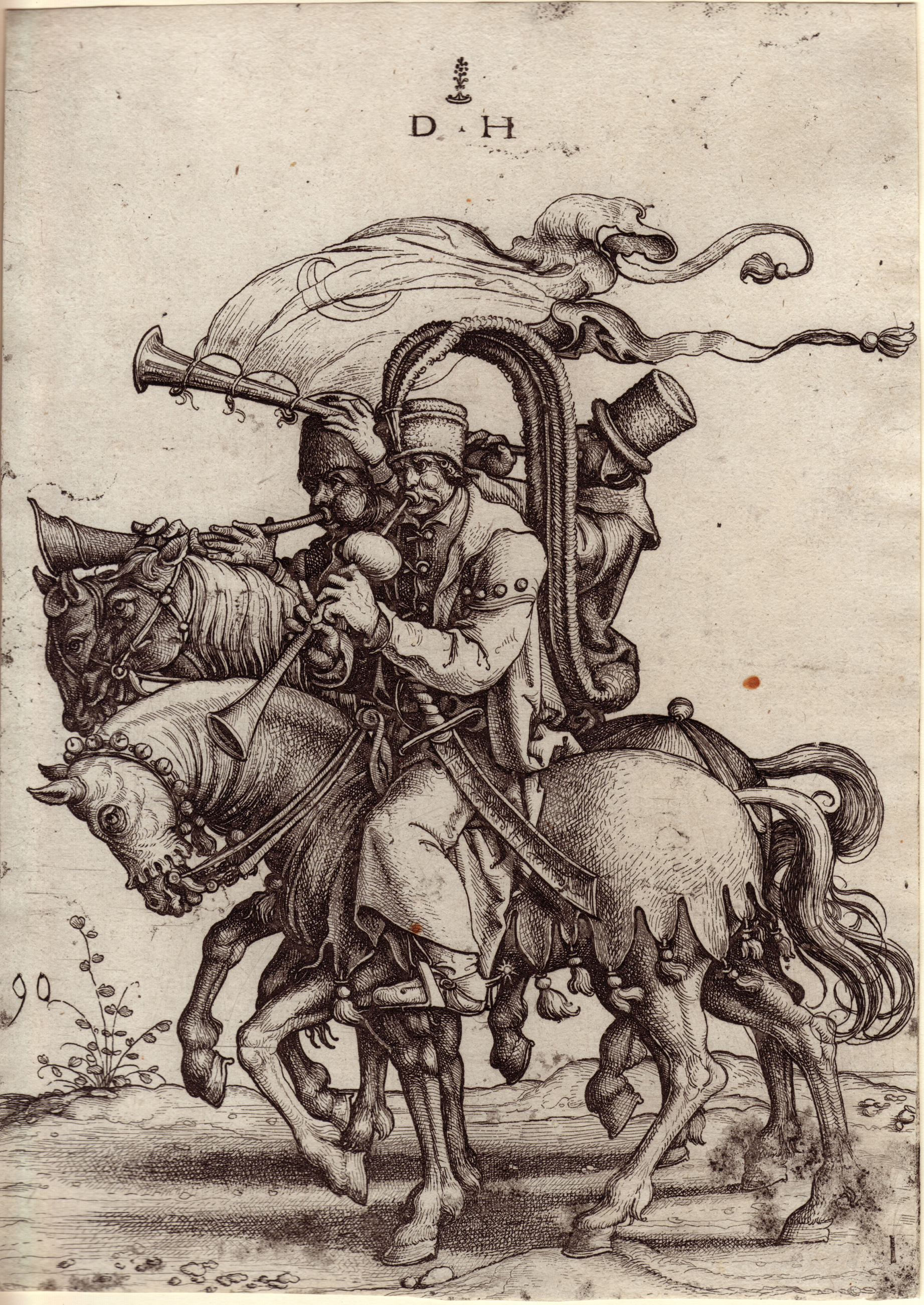 Hopfer, Daniel (ca 1470-1536): Turkish Trumpeter and two Hautbois-players, on horseback (Die türkischen Trompeter zu Pferd, nach Jan Swart). Radierung, etching. 21.6 x 15,6 cm. 21,6 x 15,6 cm. B. 56, Hollstein 64 II. Aus der Folge der berittenen Orientalen. Prachtvoller Druck auf die Plattenkante beschnitten, teils mit der vollen Darstellung. Zwei blasse Rostfleckchen, sonst tadelloses Exemplar.